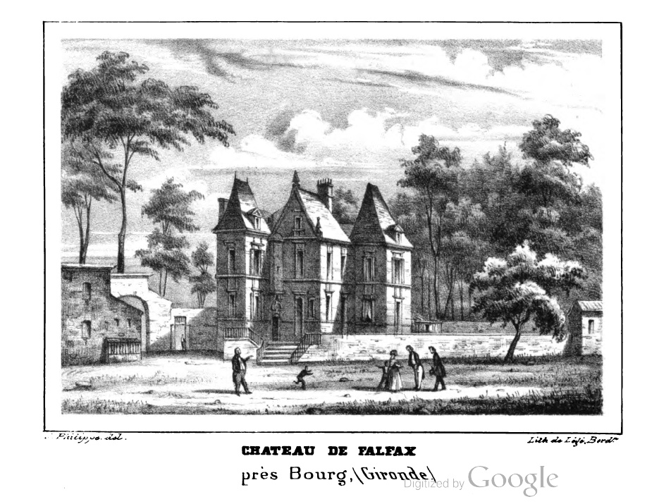 Château de Falfax - Bourg (Gironde)